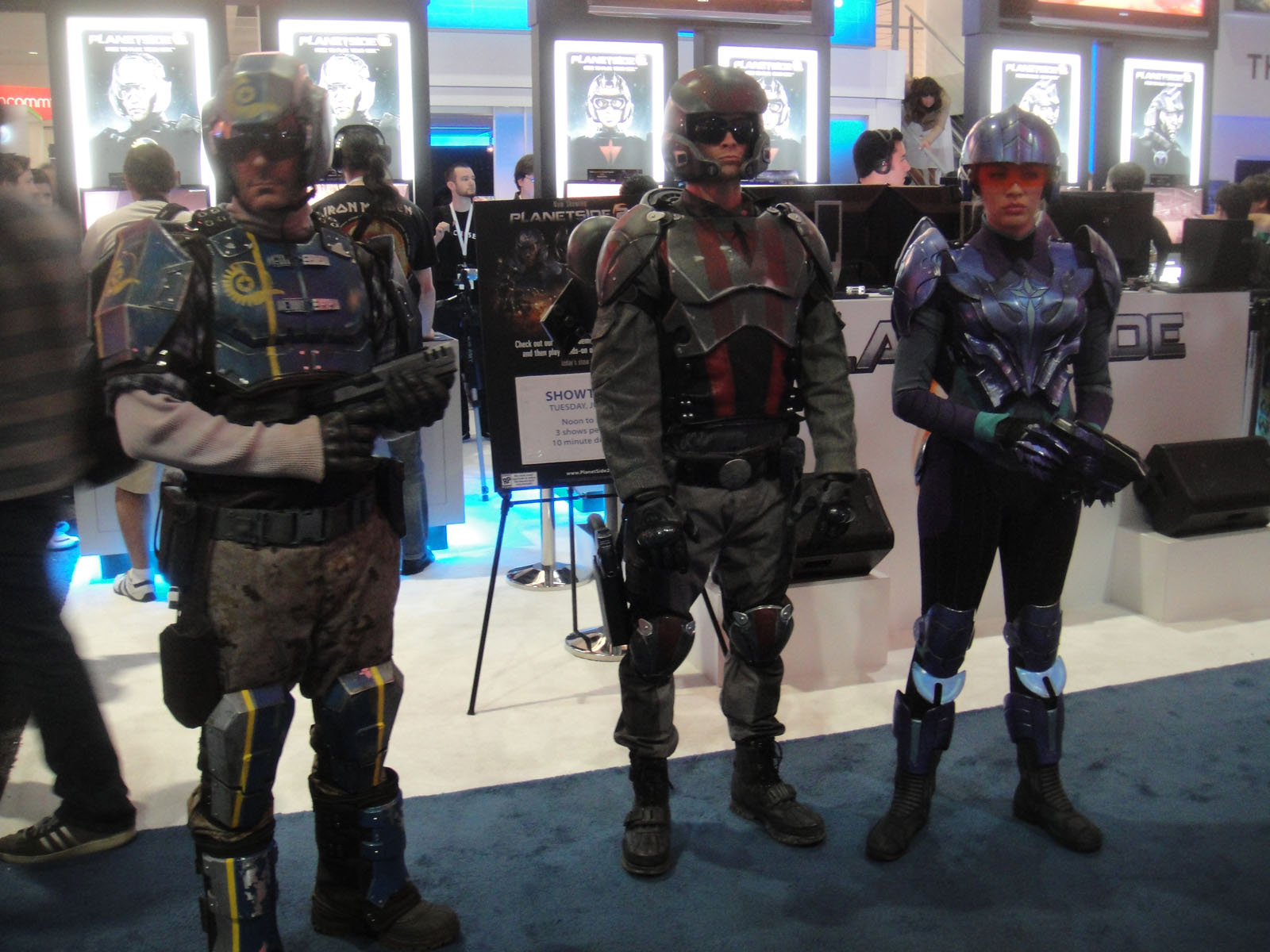 E3 Expo 2012 - Planetside soldiers